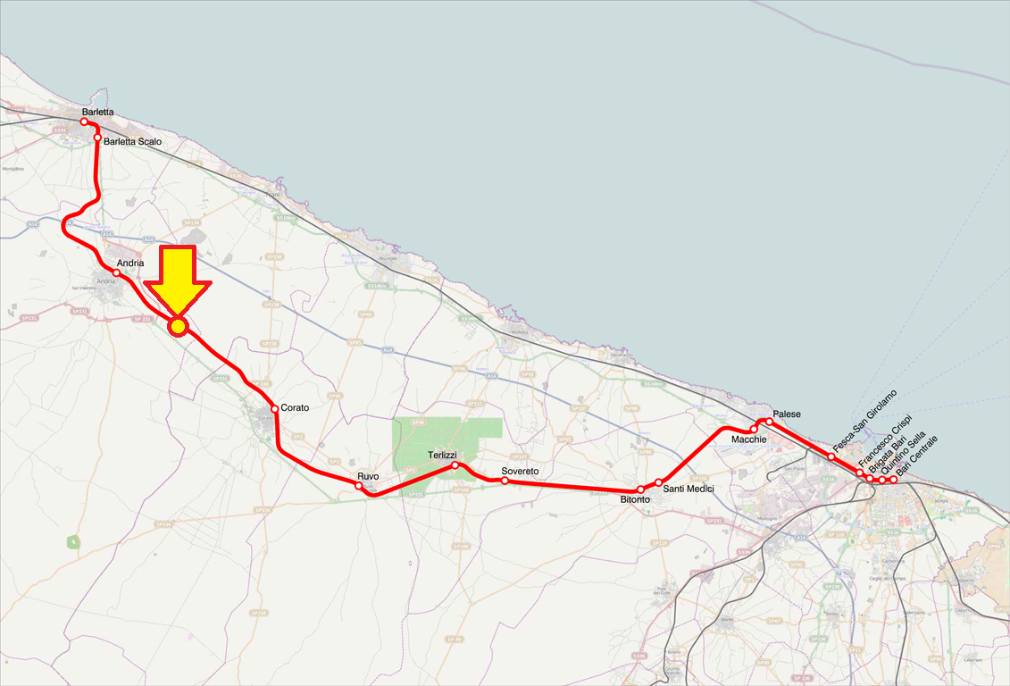 Mappa della ferrovia Bari-Barletta